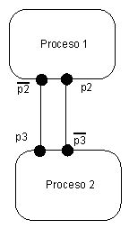 Imagen de mi autoría mostrando dos procesos en notación CCS